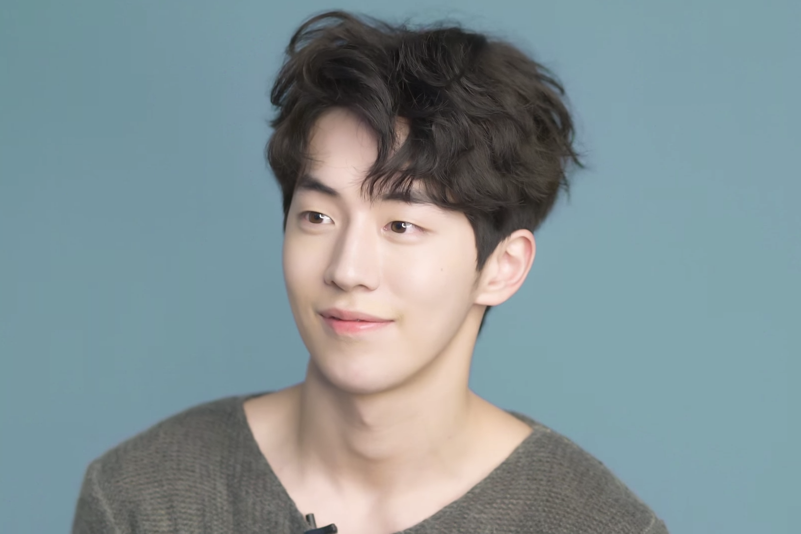 [뷰티쁠] 4월호 남주혁 화보 스케치